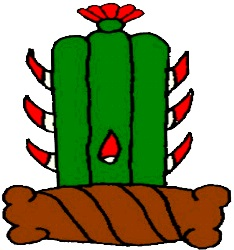 Glifo de Cardonal